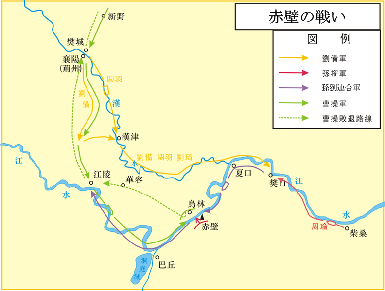 赤壁の戦いにおける軍勢の移動。